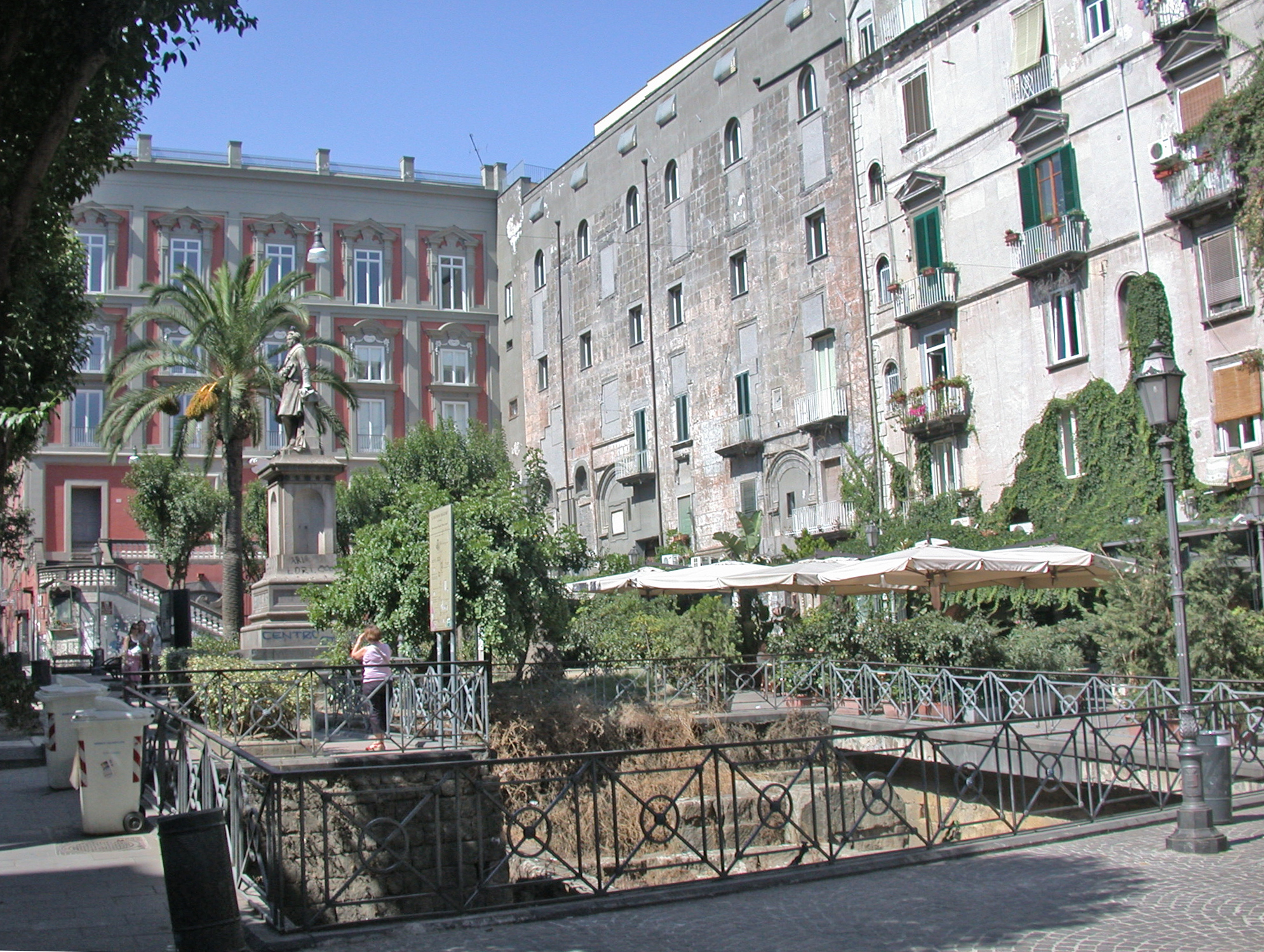 Italia, regione Campania, Napoli, piazza Bellini. In primo piano, i resti delle mura greche della città.